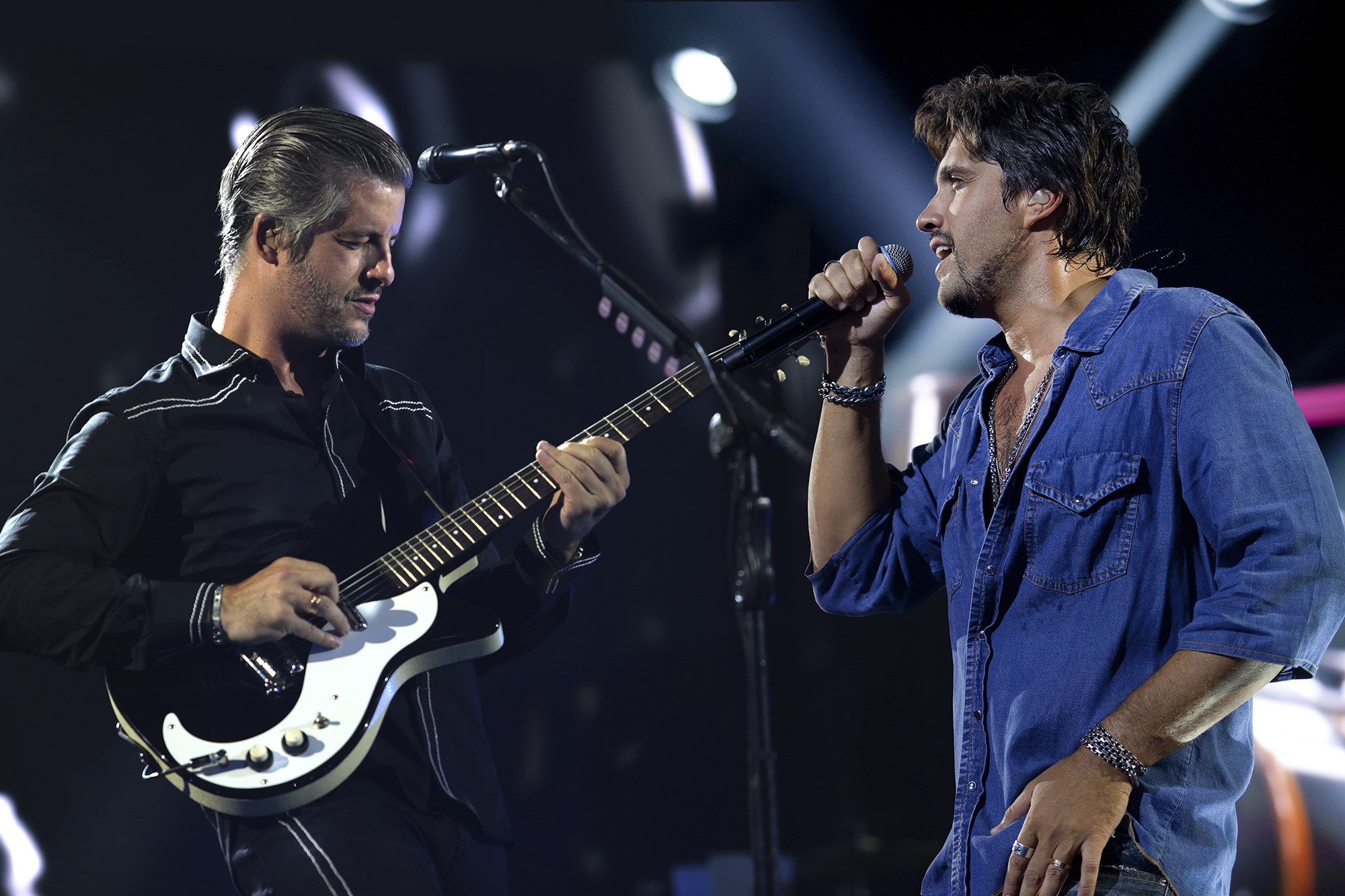 Divulgação DVD "Irmãos" Victor e Leo